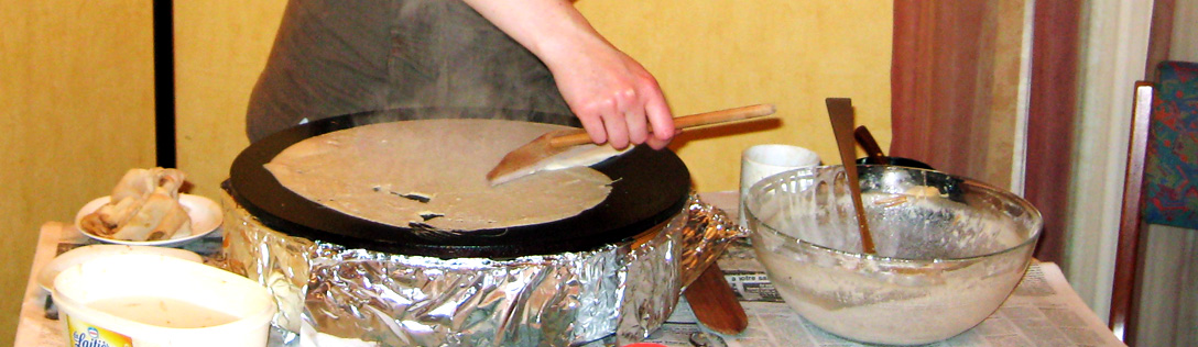 Fabrication de crêpes de blé noir sur un billig. La pâte est étalée à l'aide d'un rozell.